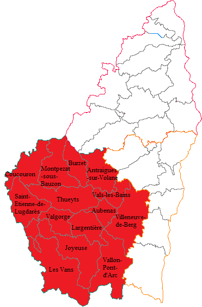 Troisième circonscription législative de l'Ardèche